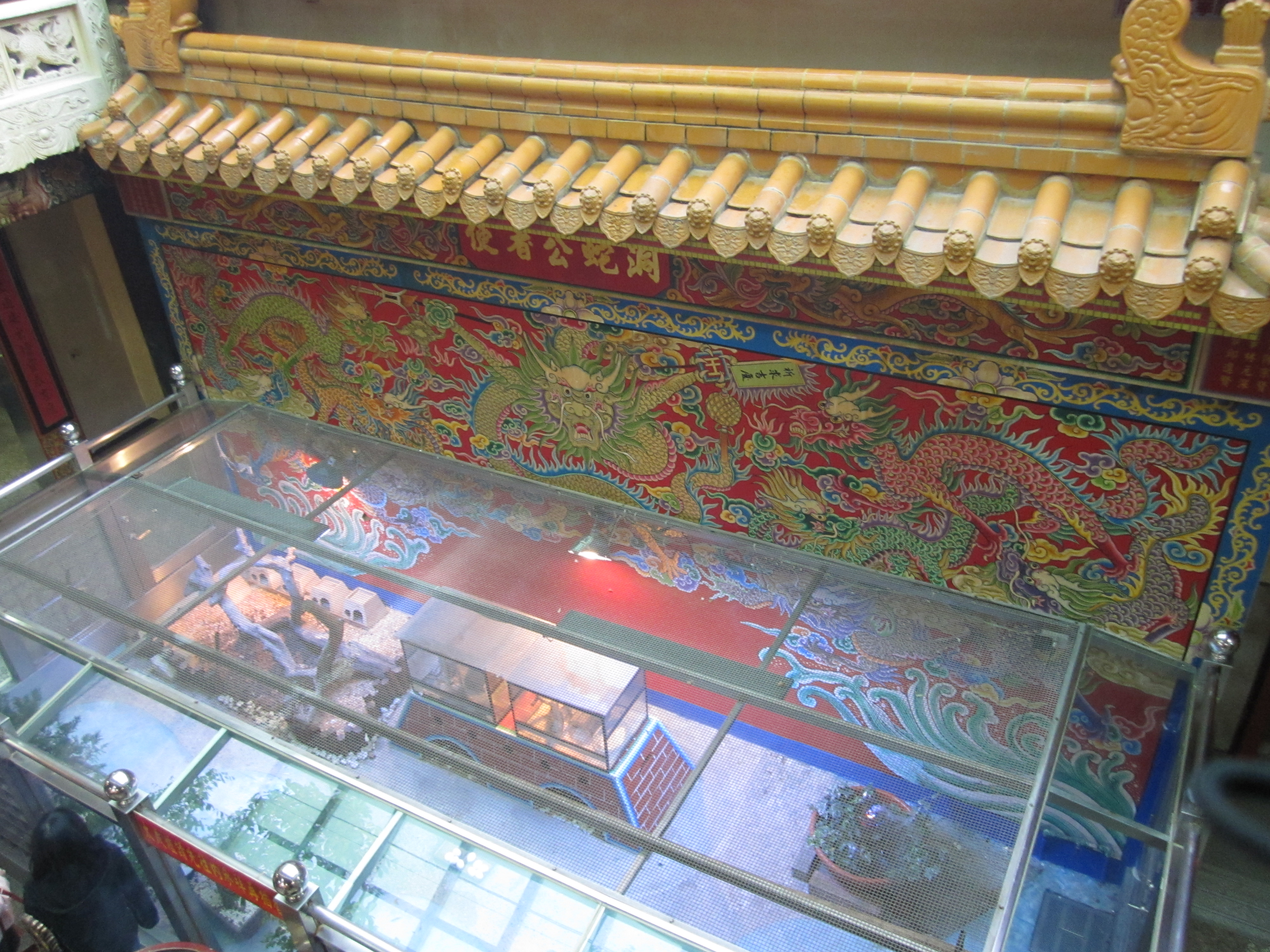 中文（台灣）: 使者公蛇洞，以安置錦蛇（臺灣南蛇）。